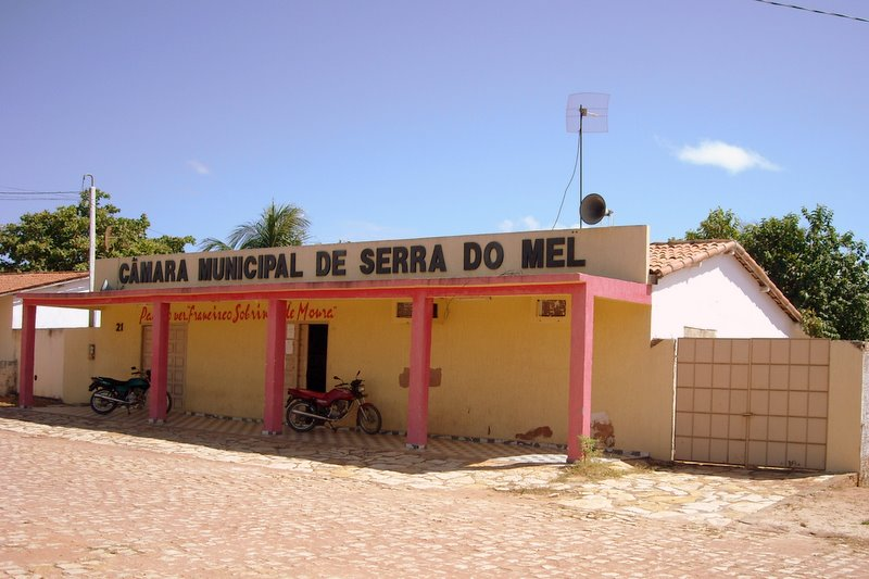 Atual prédio da Camara Municipal de Serra do Mel